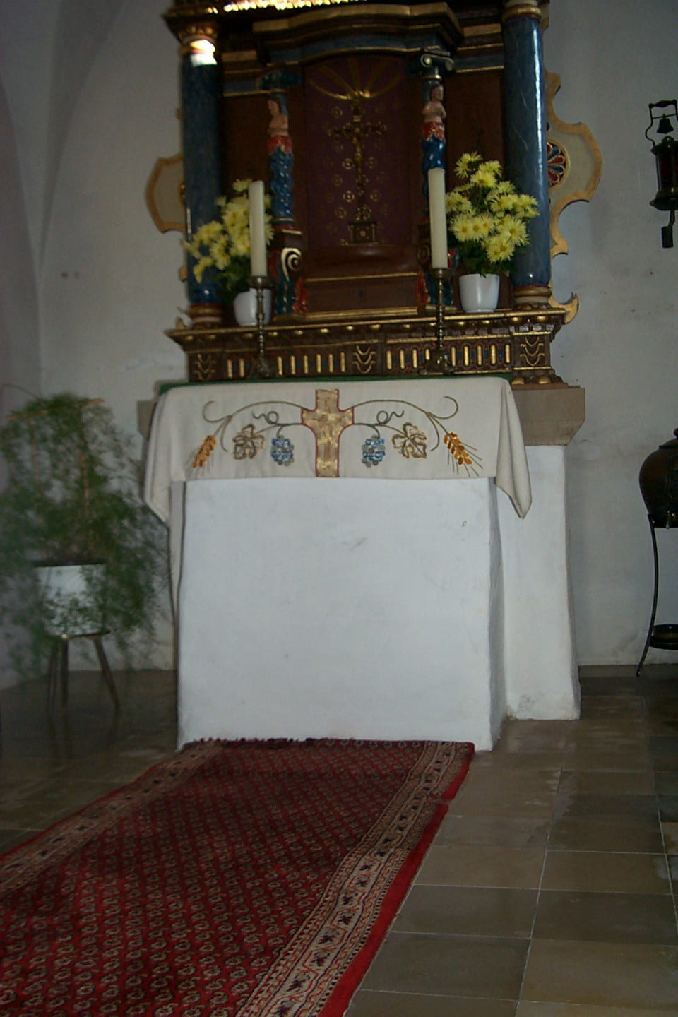 Der Monolith von Niederstedem. Die Altarplatte des alten Zelebrationsaltars (nicht des neuen nach dem 2. Vatikanischen Konzil eingebauten Zelebrationsaltars direkt davor) ruht auf einem großen, roh behauenen Monolith. Da dieser mit weisser Farbe überstrichen ist, ist seine Oberflächenstrukur leider nicht erkennbar. Aufgrund mehrer Parallelbeispiele der Verwendung von Menhirteilen in christlichen Altären (z. dem 1992 entdeckten in Latsch) und der Nähe zum Ferschweiler Plateau mit seinen vielen Menhiren und anderen vorgeschichtlichen Denkmälern wäre auch hier eine Zweitverwendung eine Menhirs denkbar - wenn auch kaum beweisbar.